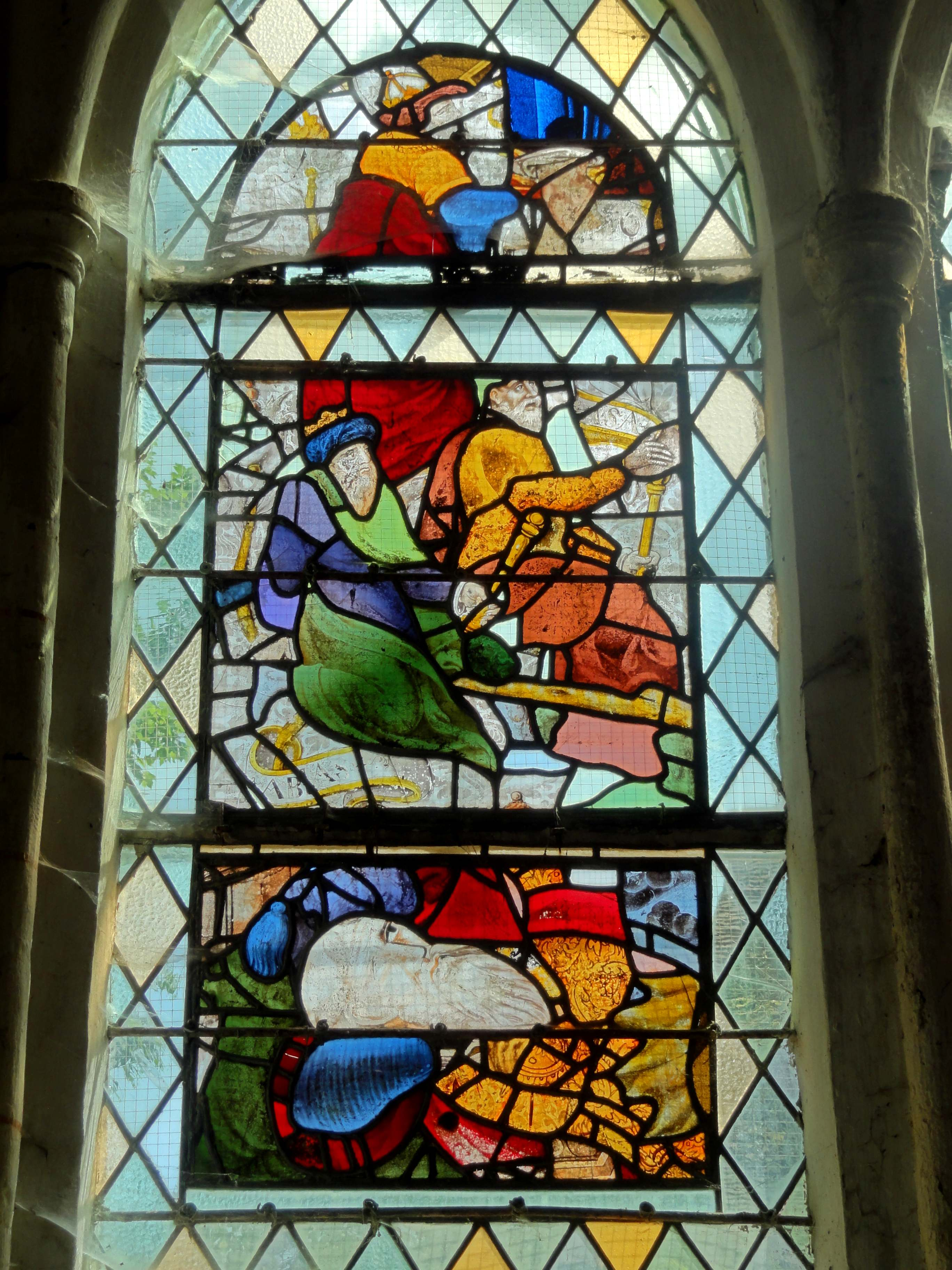 Verrière n° 2 - arbre de Jessé (fragments).